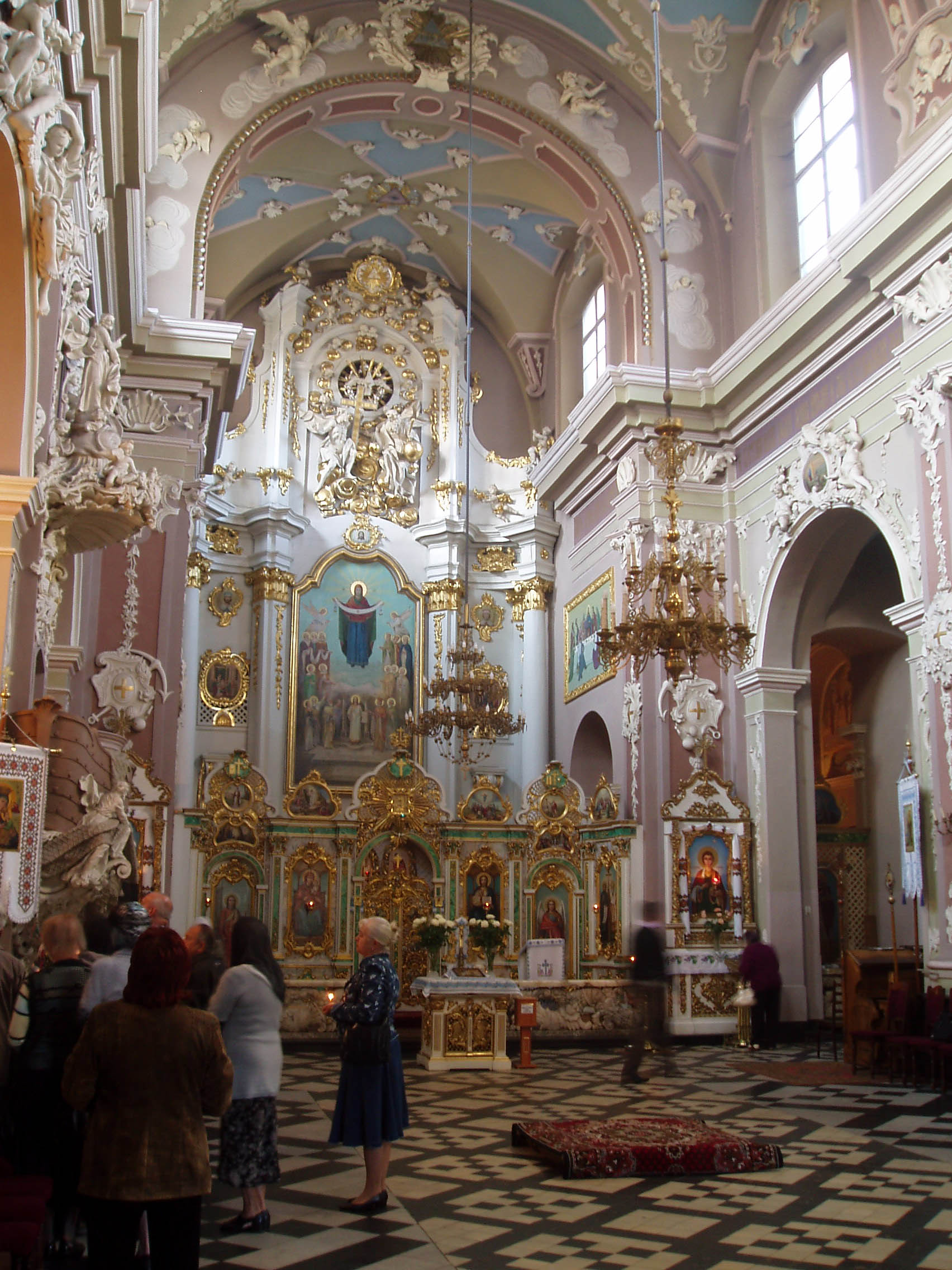 Церква святого Миколая на вулиці Грушевського у Львові.